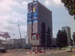 Regideso (Régie de distribution d'eau), 59, Boulevard du 30 Juin, image prise à partir d'un portable et il pleut.